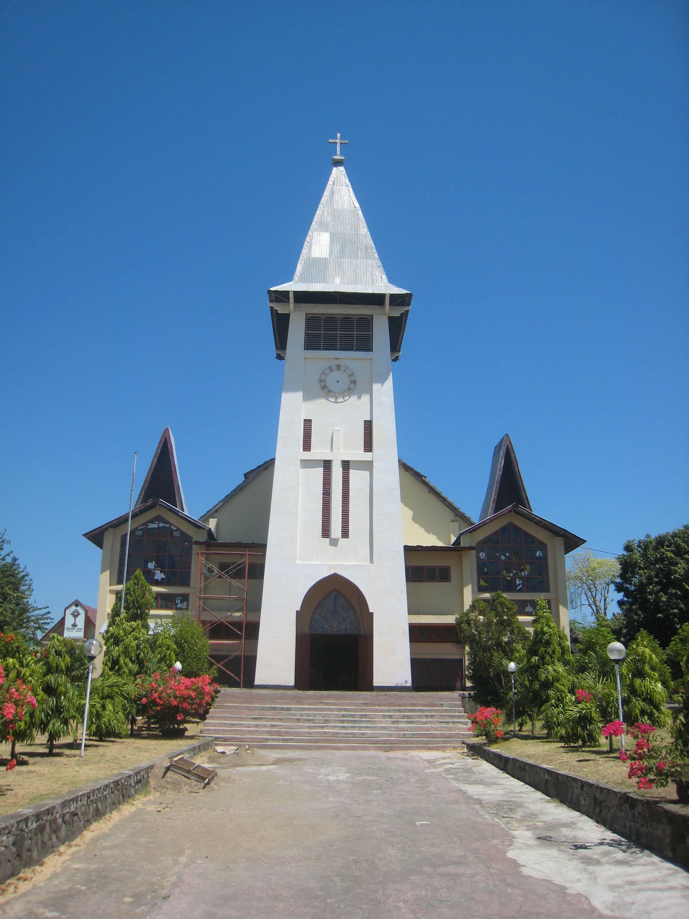 Cattedrale di Maumere